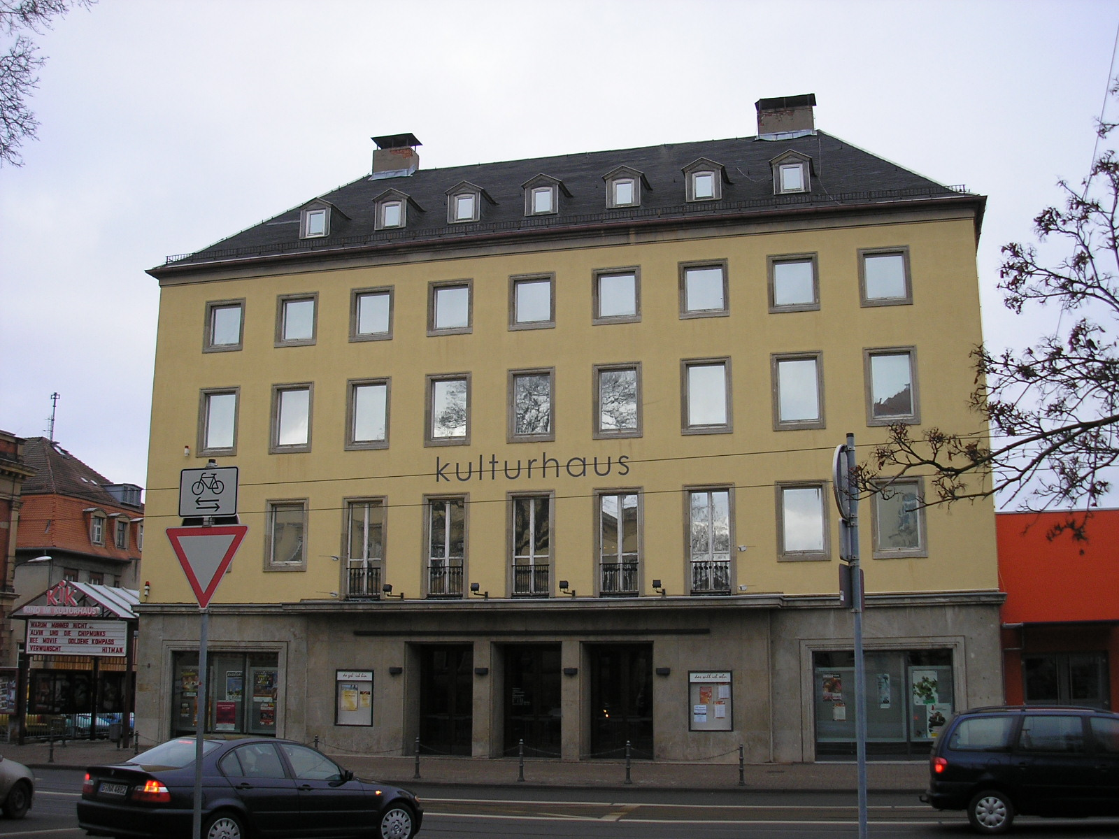 Das Kulturhaus in Gotha (Thüringen).